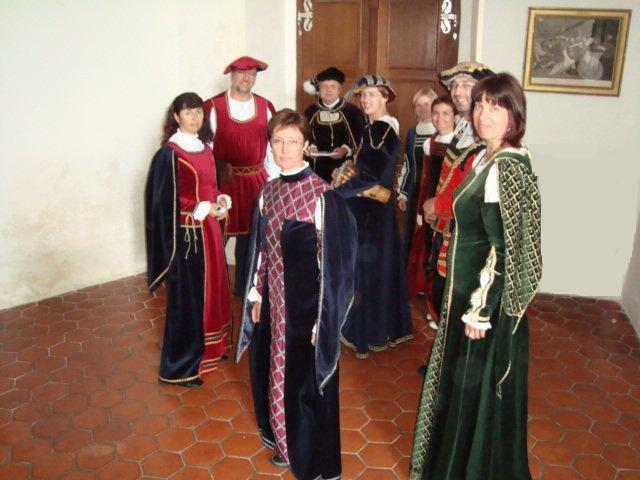 smíšený komorní sbor